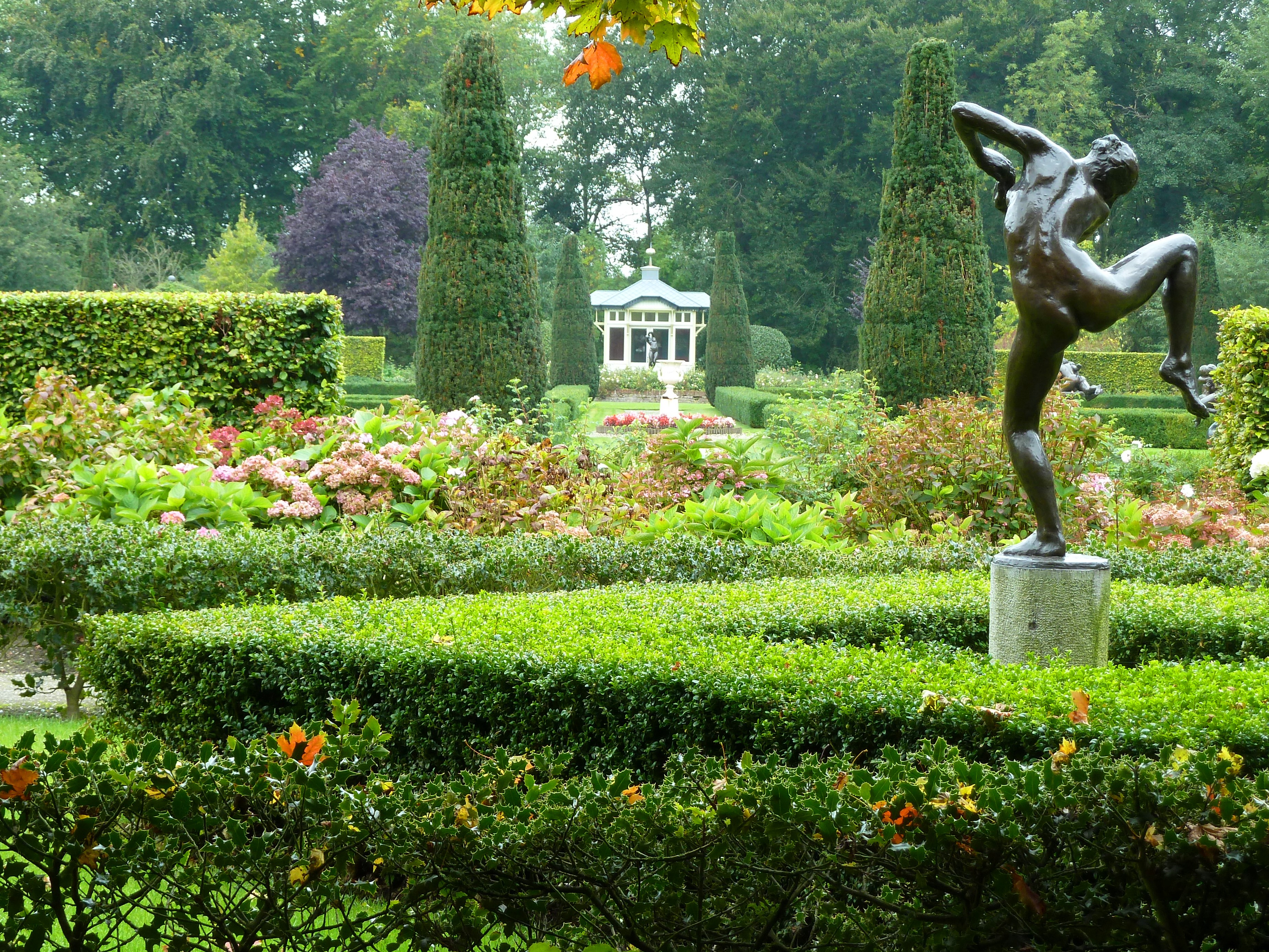 Borg Verhildersum, borgtuin.